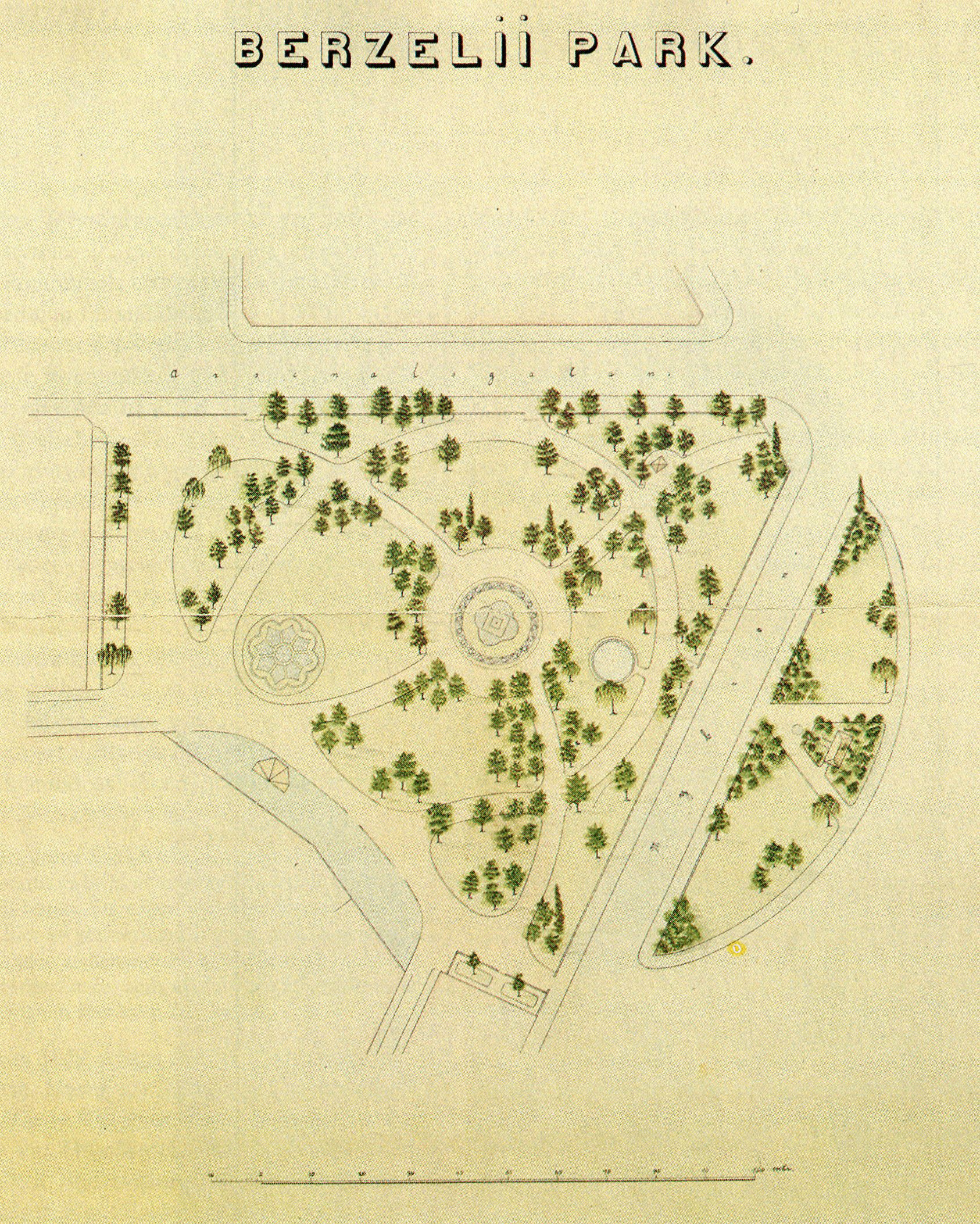 Ritning för Berzelli park